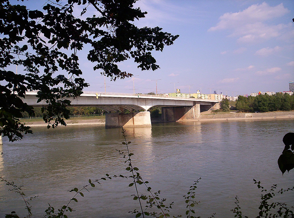 Budapest, Árpád híd